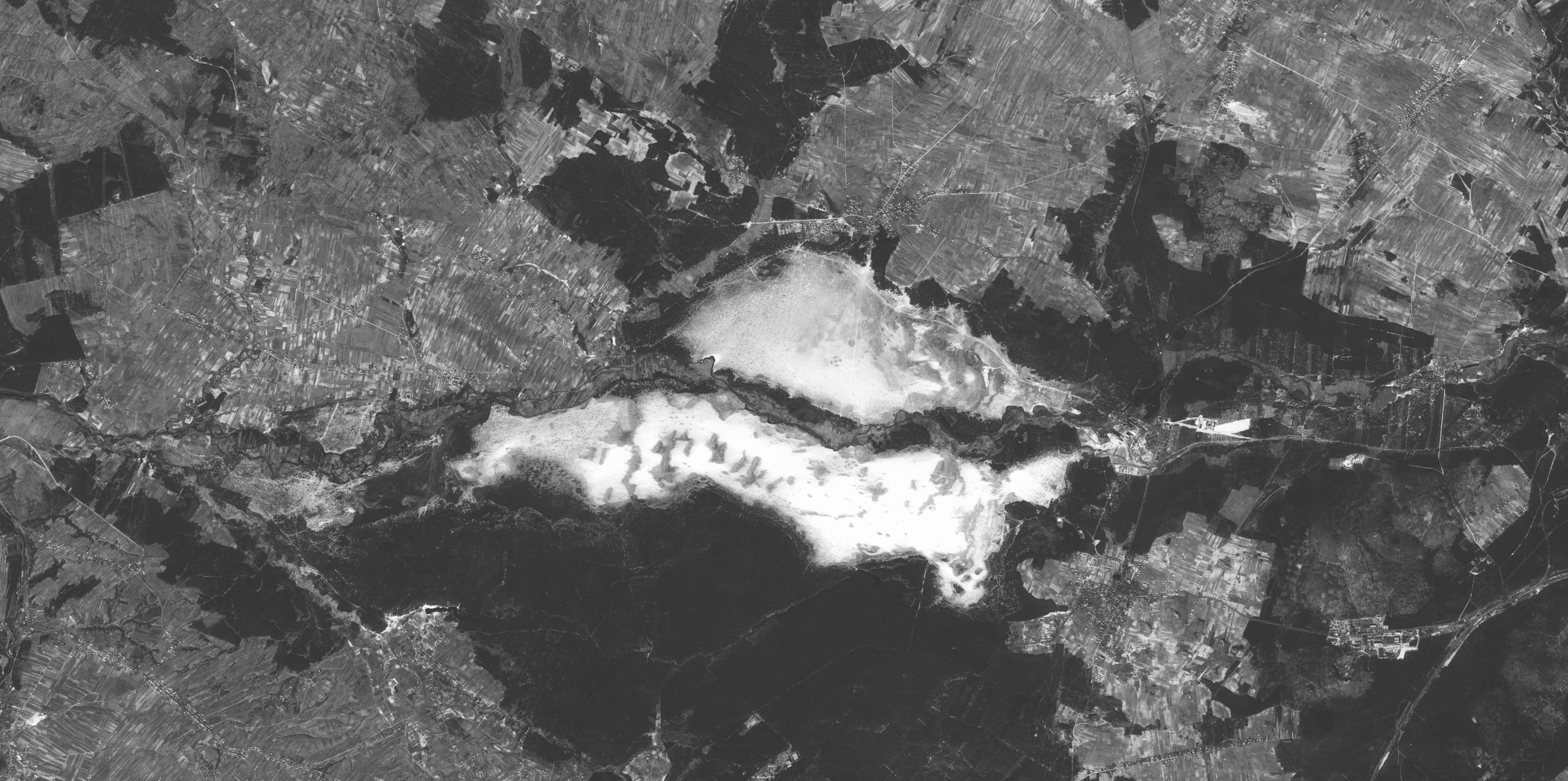 Pustynia Błędowska sfotografowana 25 marca 1968 przez amerykańskiego satelitę wywiadowczego Corona 124 (KH-4A 1046-2). Zdjęcie stanowi część klatki nr 34 (DS1046-2168DA034 34 b).